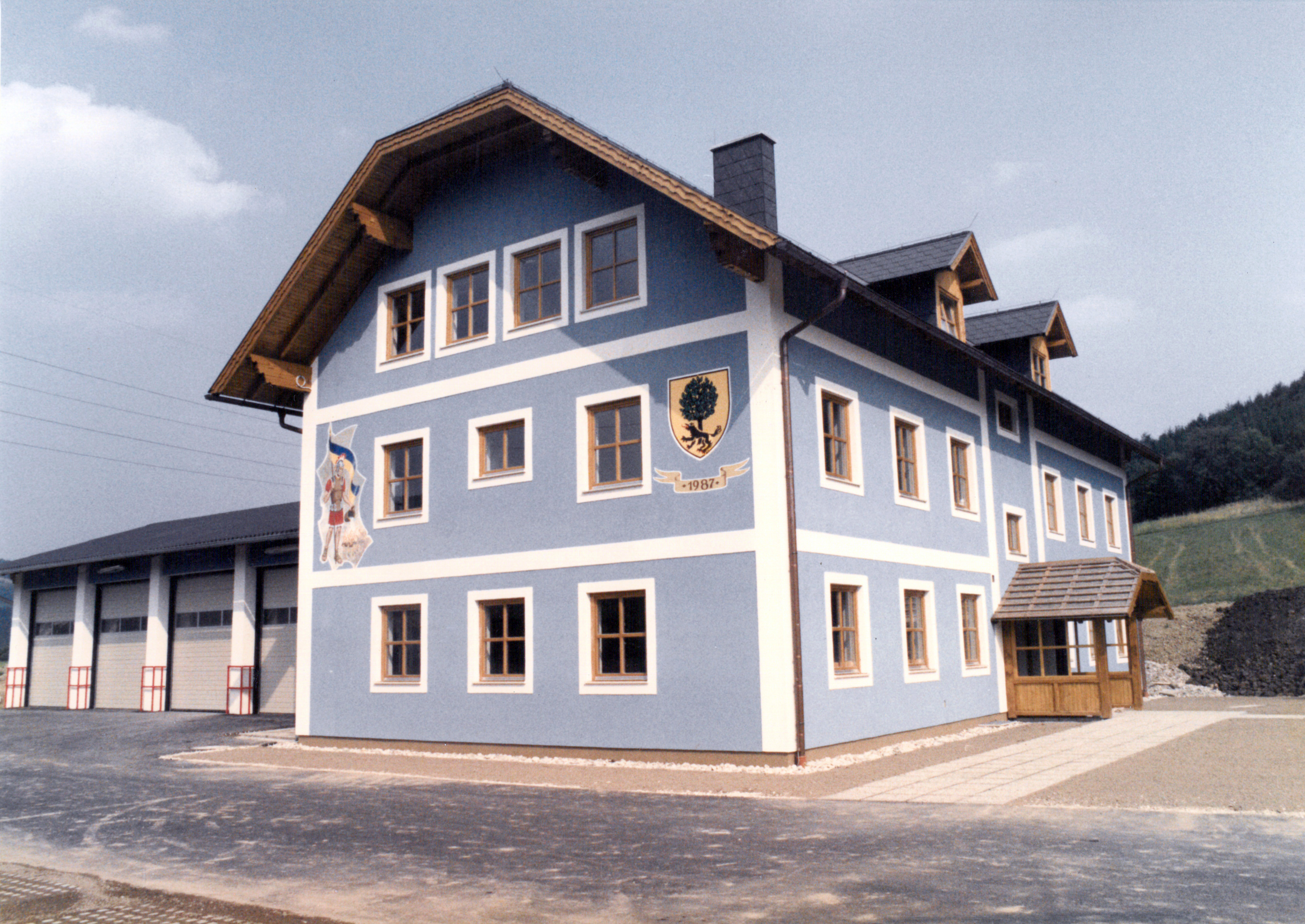 Neues Feuerwehrhaus im Jahr 1987